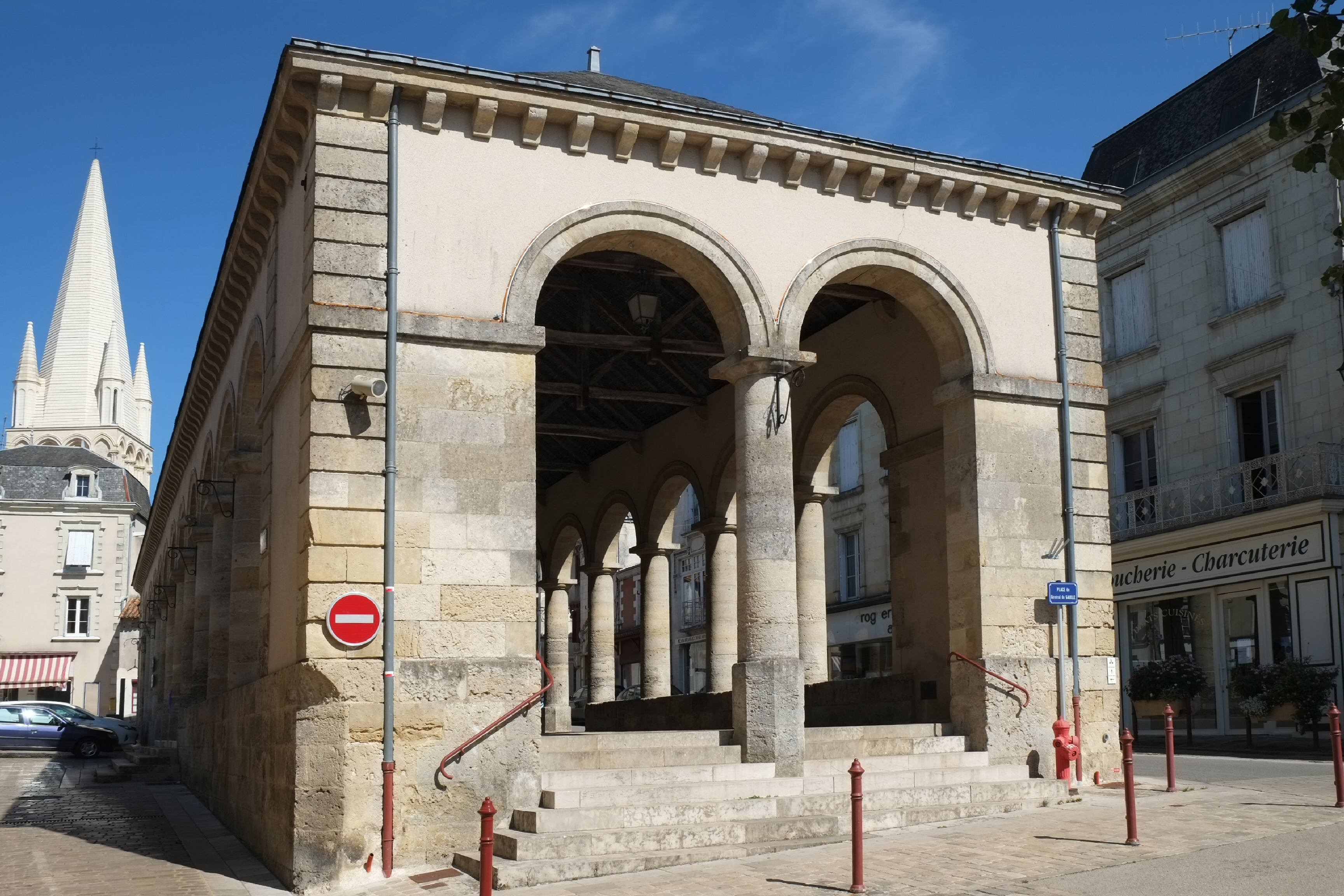 Halle Airvault Deux-Sèvres France